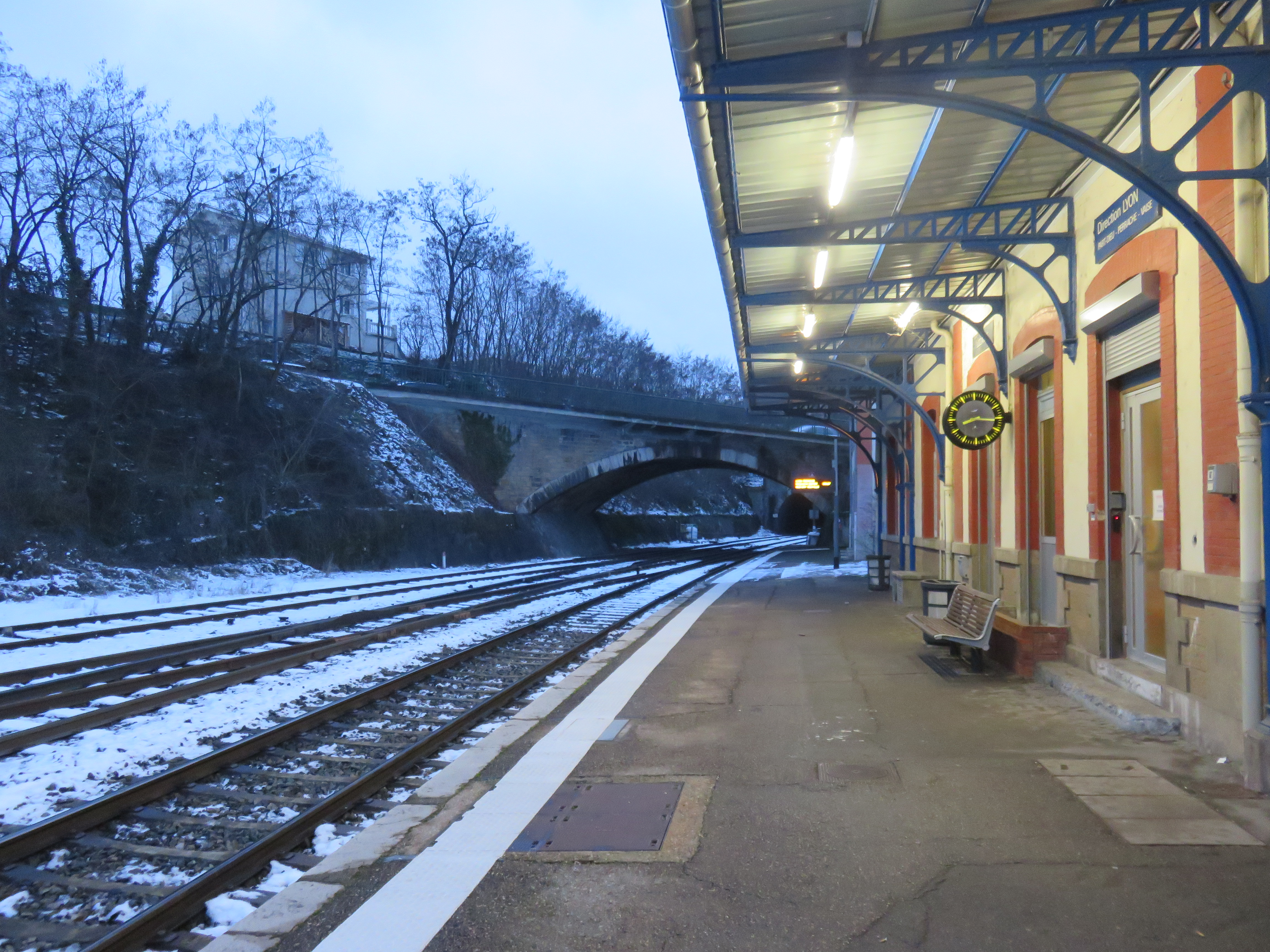 Vue du quai A (direction Roanne-Paray), de la gare de Lozanne (Rhône, France).